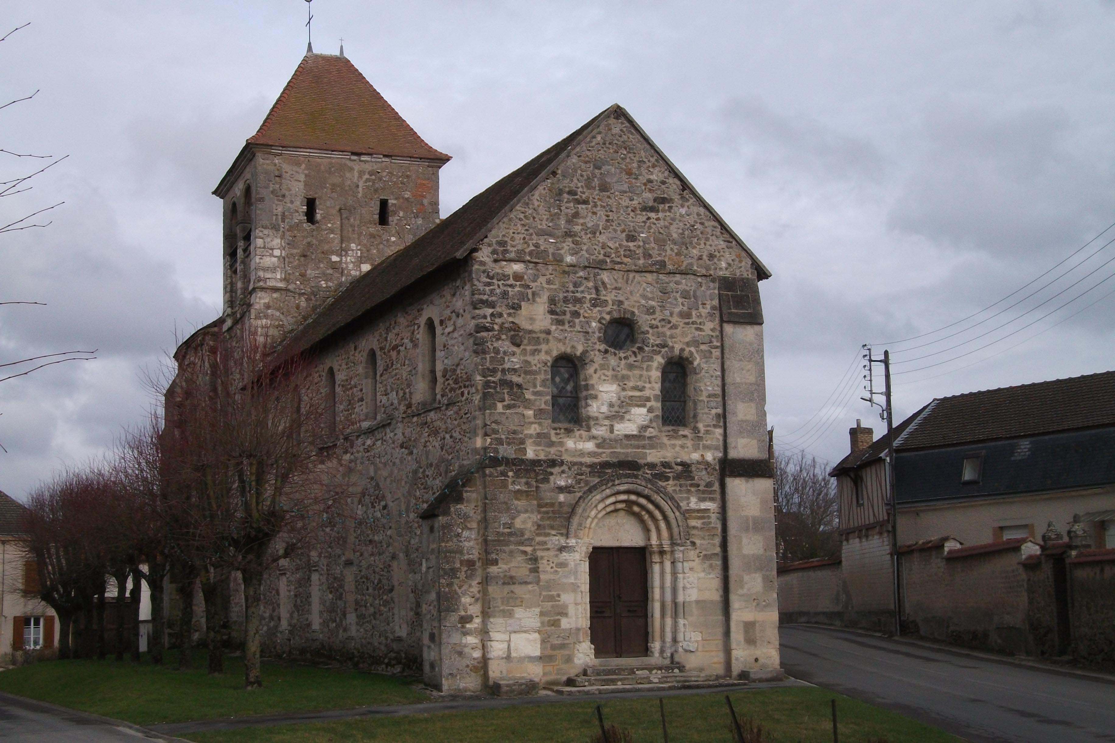 Église_Villers_aux_noeuds_, vue de son portail ouest.